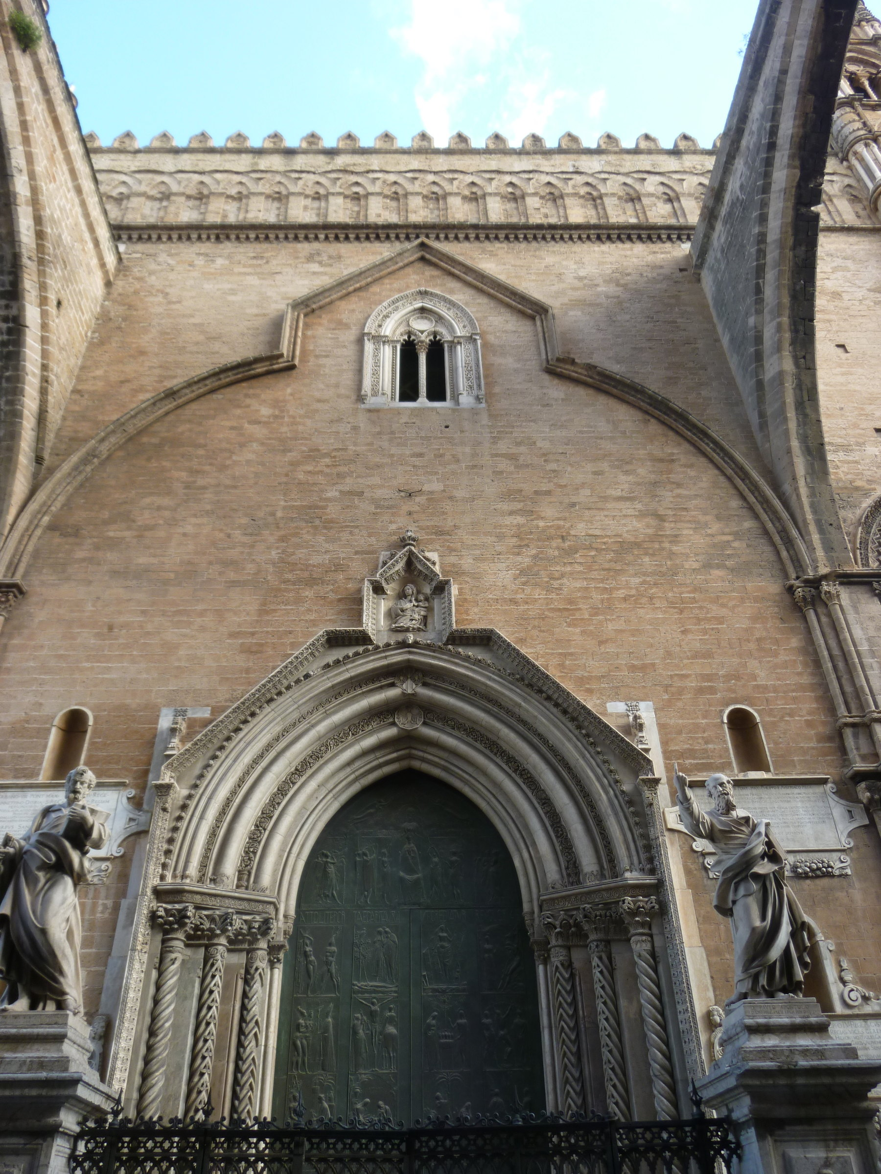 Palermo